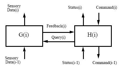 RCS-2 control paradigm